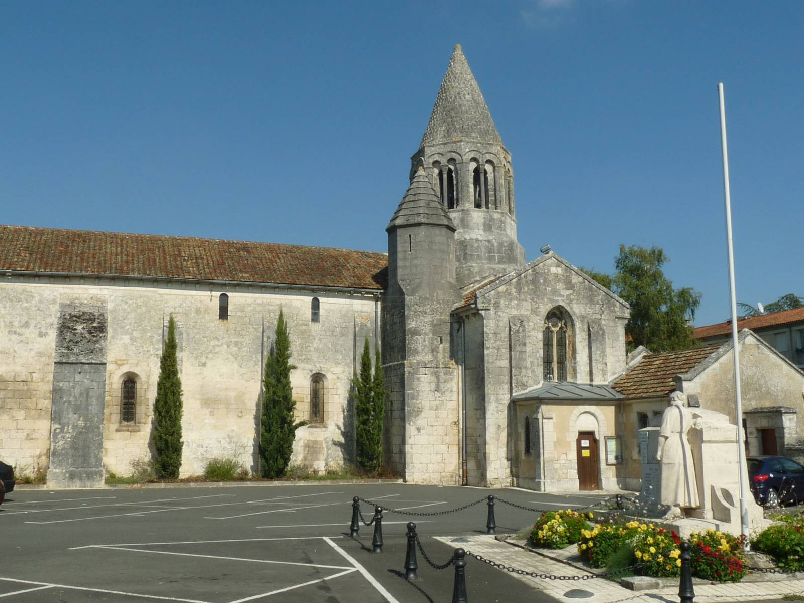 église de La Couronne (16), France